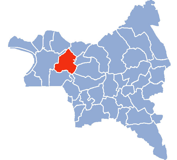 Auteur Hervé SUAUDEAU Licensing Catégorie:Cartes de Seine-saint-Denis